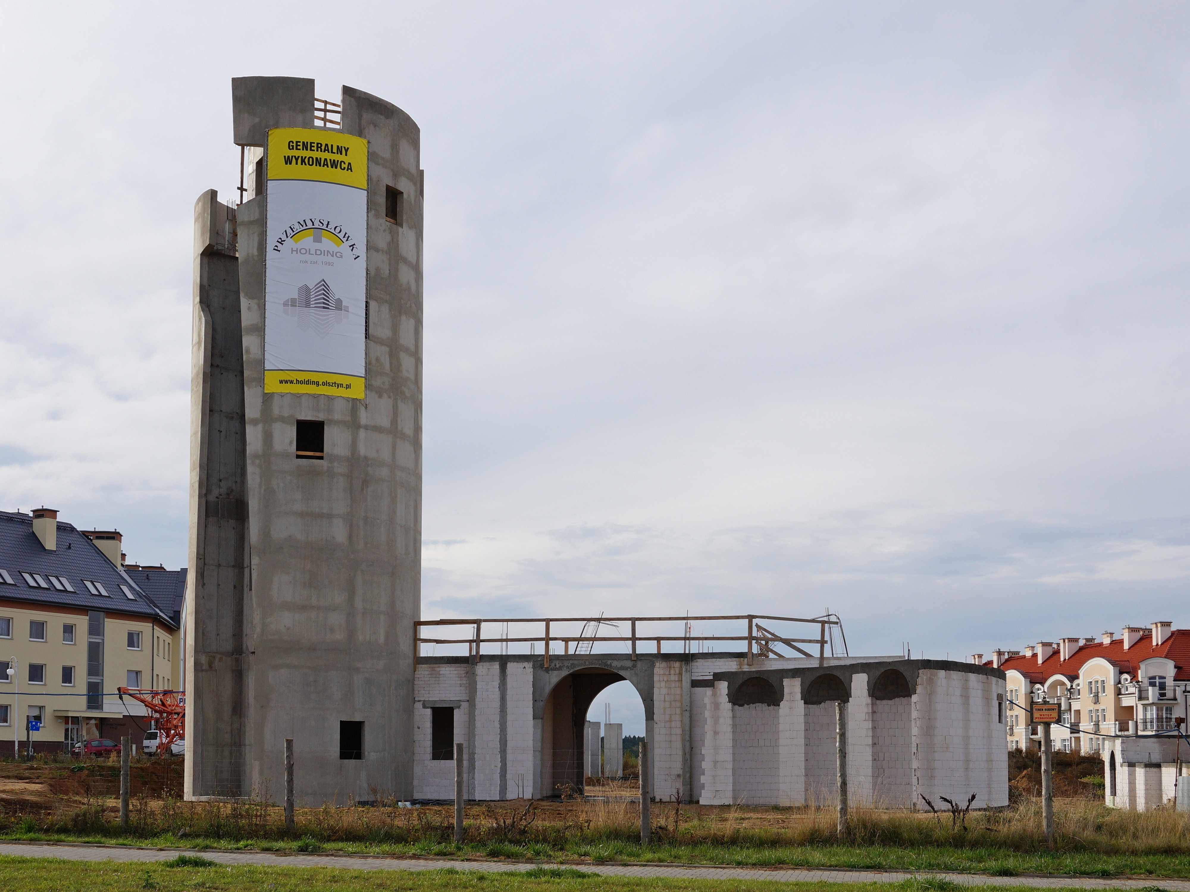 Olsztyn - kościół Św. Mateusza (w budowie).